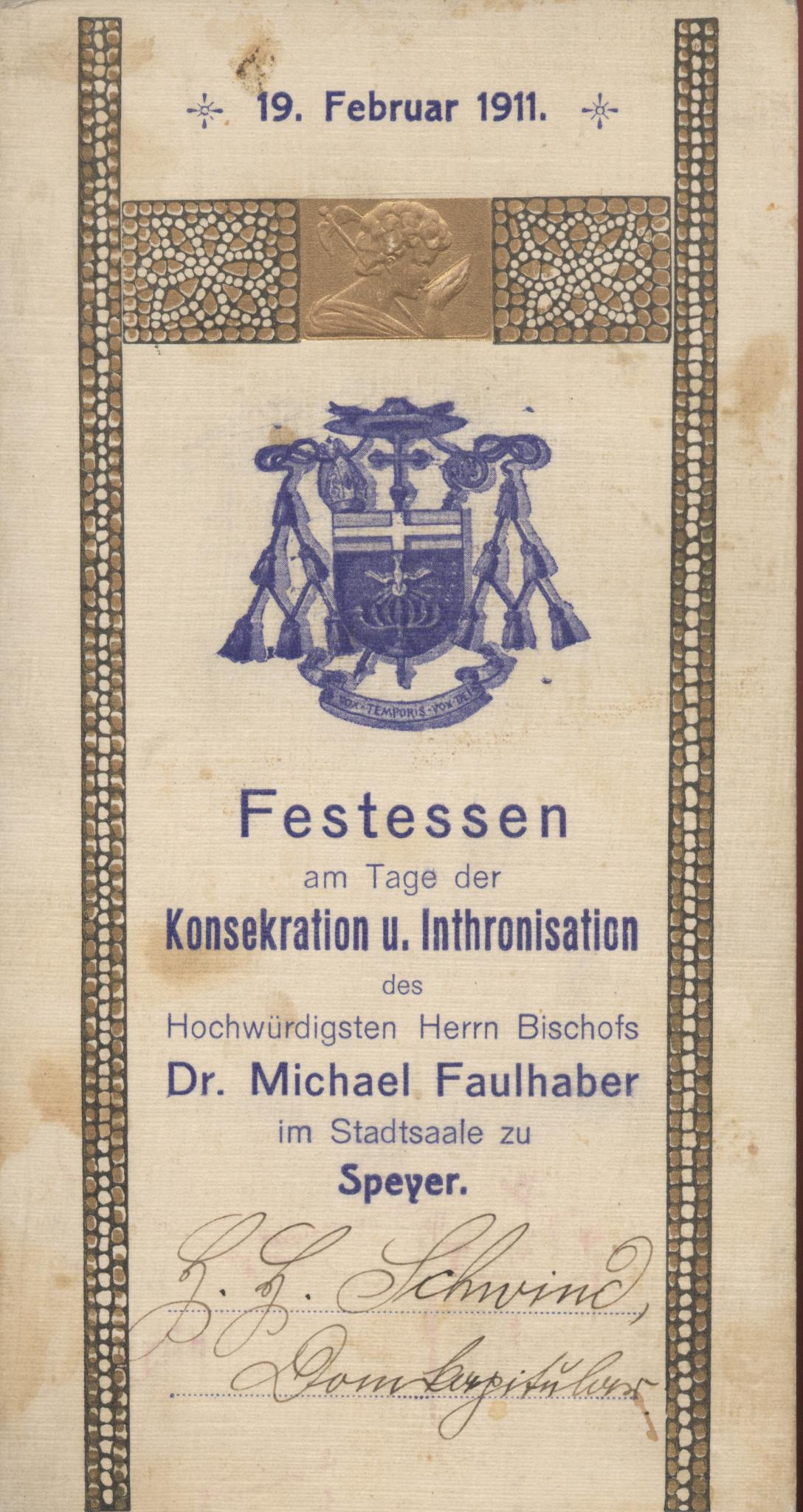 Domkapitular Joseph Schwind Speyer, persönliche Einladungskarte